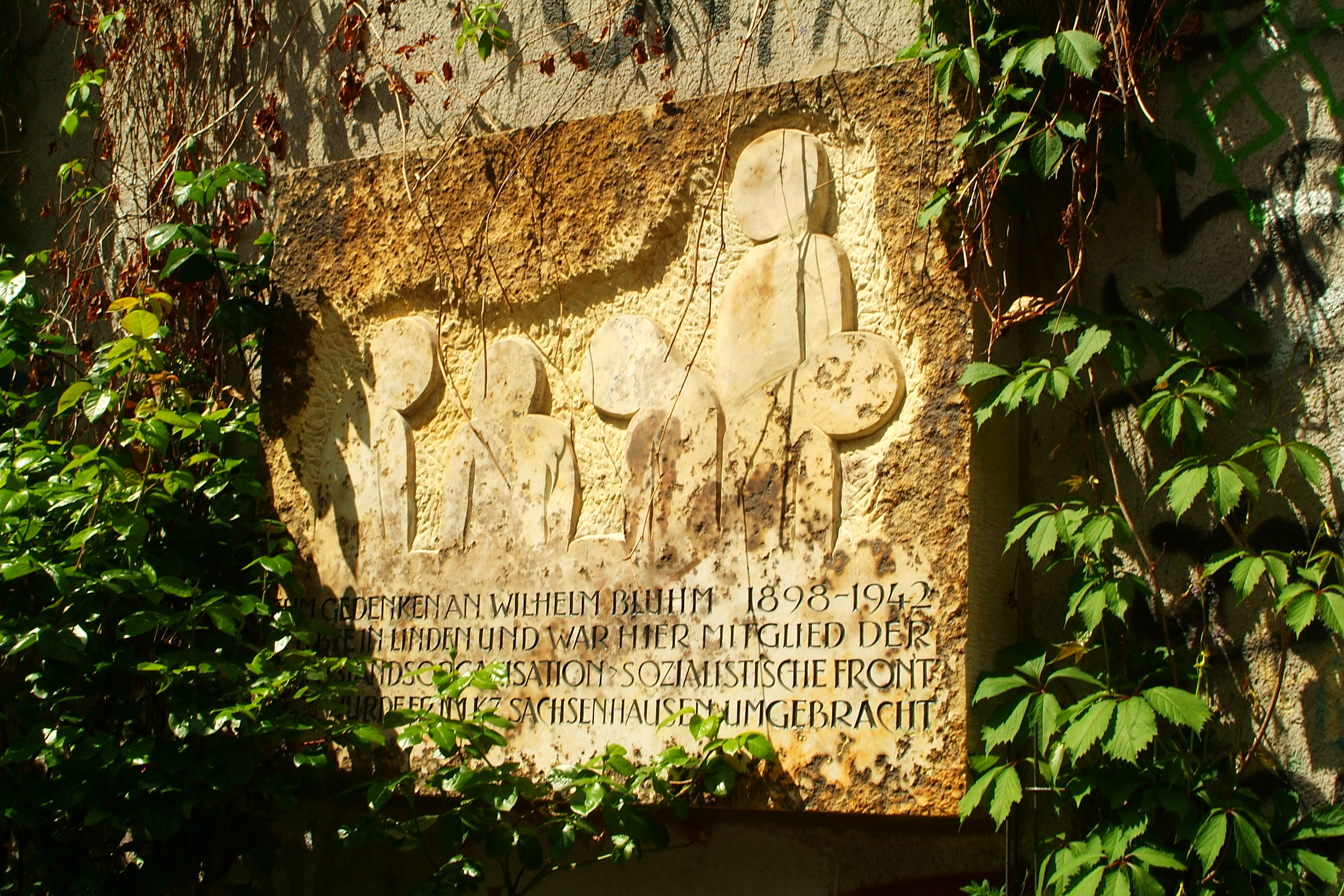 Die leicht zugewachsene Gedenkplatte für den ermordeten Widerstandskämpfer Wilhelm Bluhm an einem Gebäude von Faust e.V.